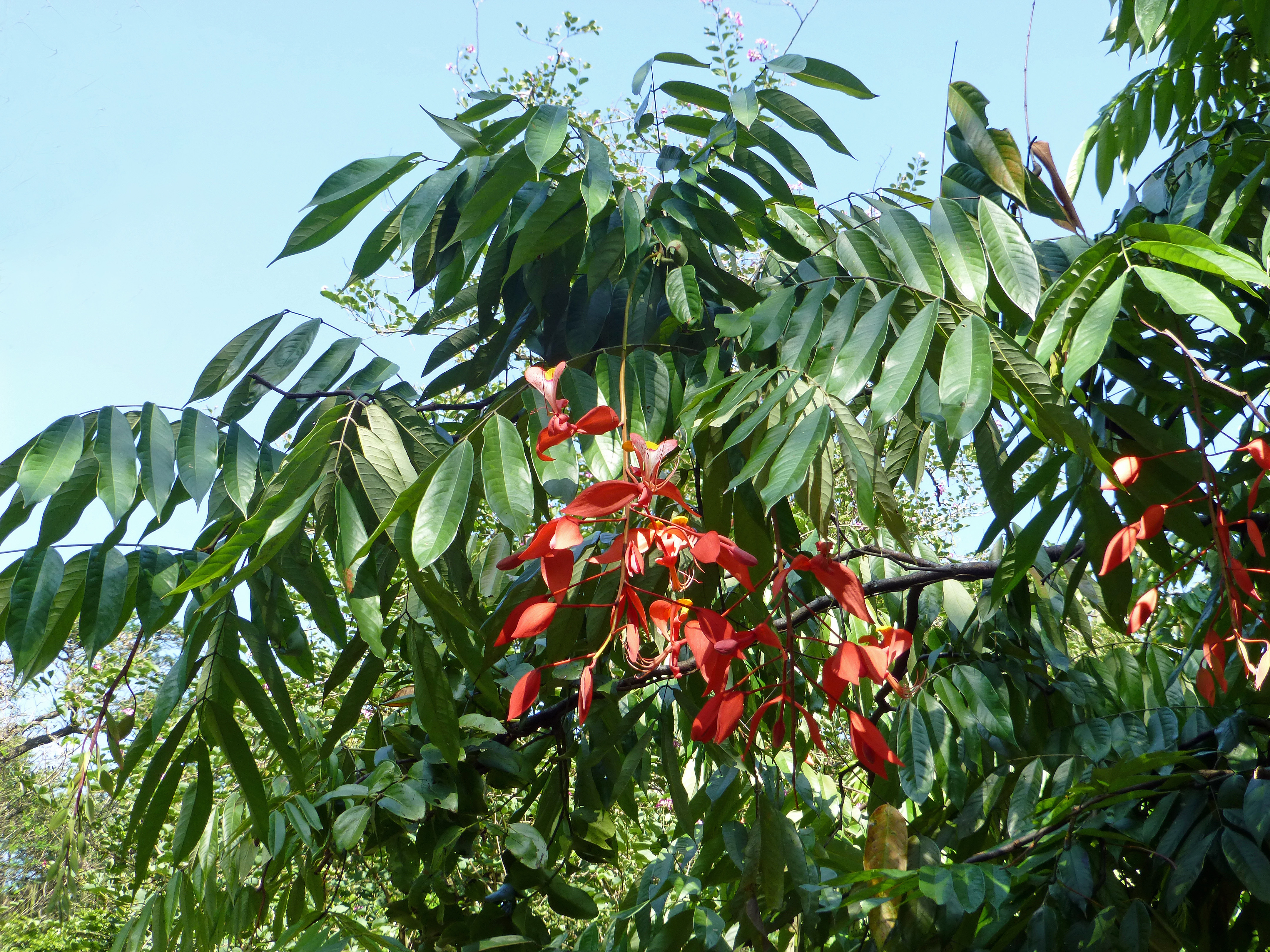 Amherstia nobilis au Jardin botanique de Kandy (Sri Lanka). Planté par l'amiral Louis Mountbatten le 21 juillet 1945.